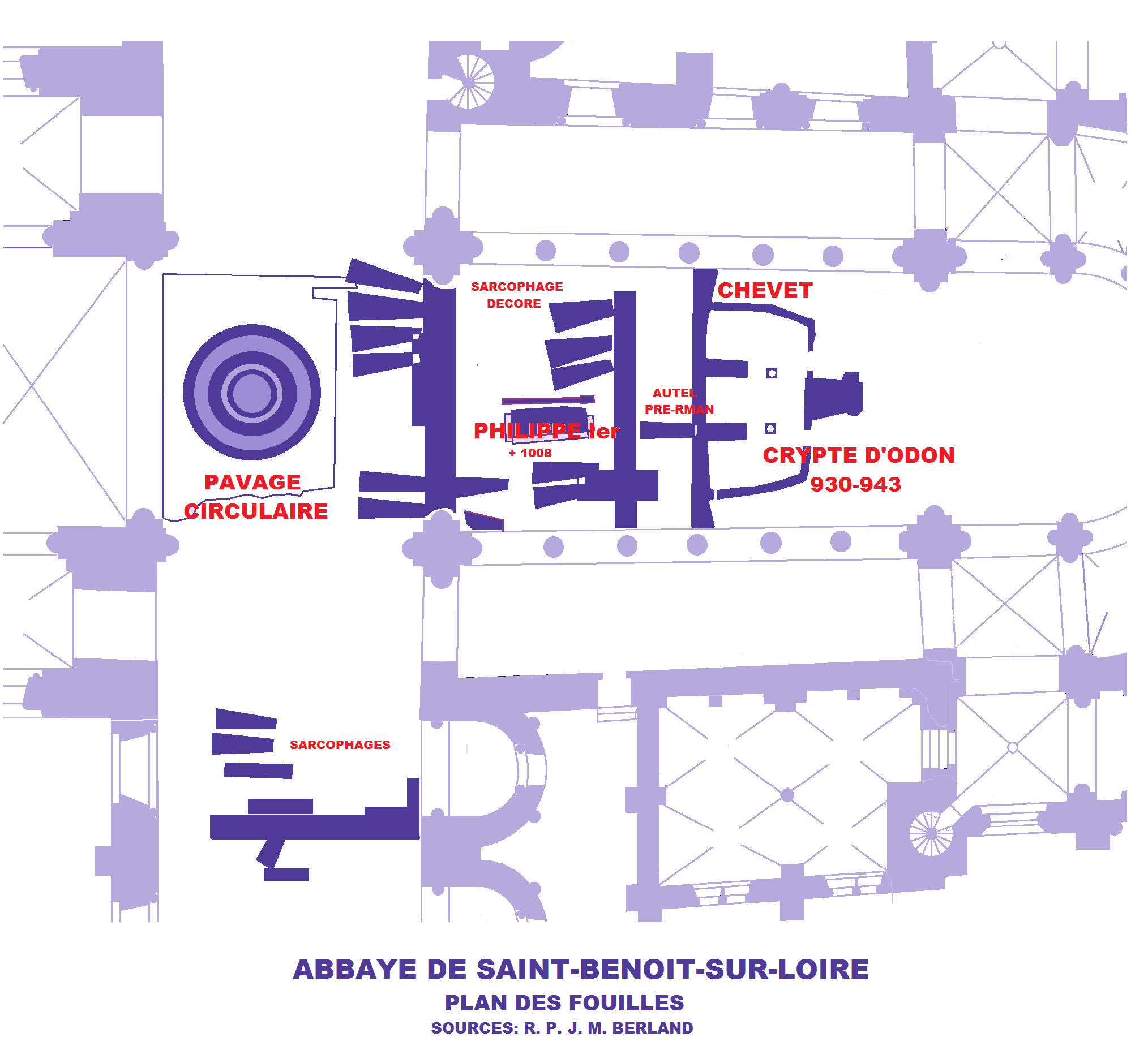 Abbaye de Saint-Benoît-sur-Loire, Plan des fouilles